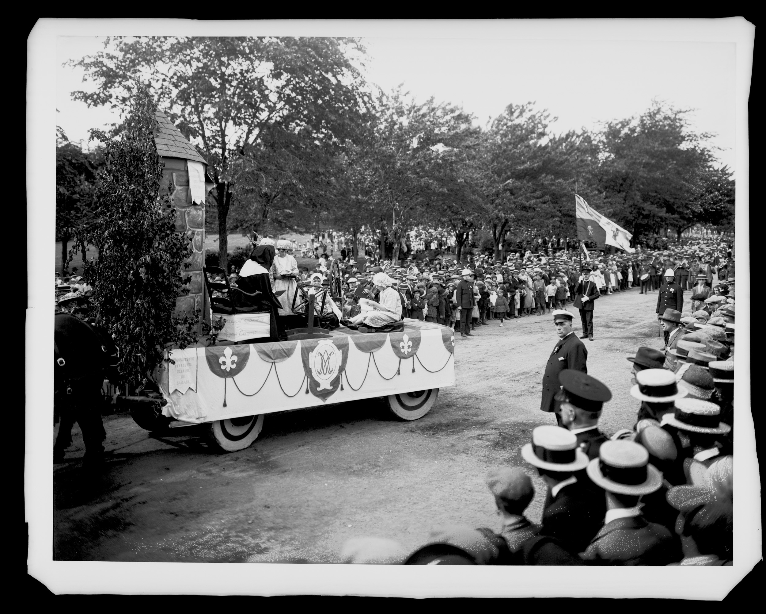 Procession de la Saint-Jean-Baptiste à Montréal, char allégorique, 24 juin 1924, Photographie d’Edgar Gariépy, négatif sur verre, Musée national des beaux-arts du Québec, Fonds Edgar Gariépy